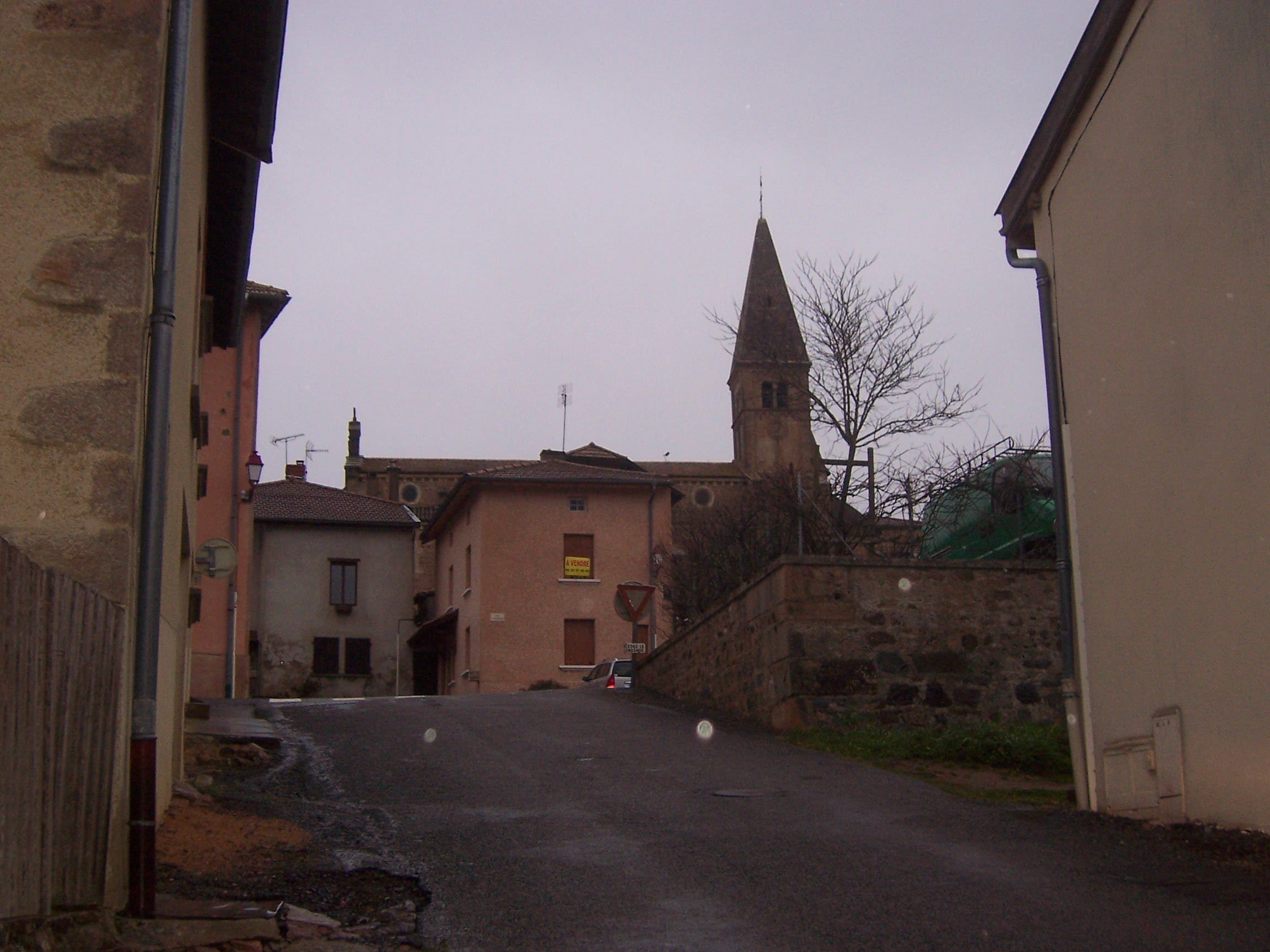 Eglise de Trambly